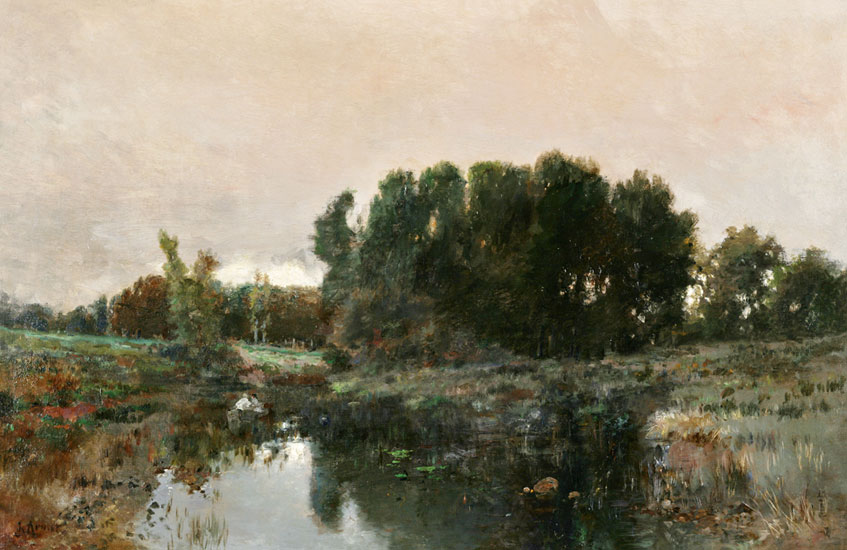 Paisaje del pintor español José Armet Portanell (1843-1911)